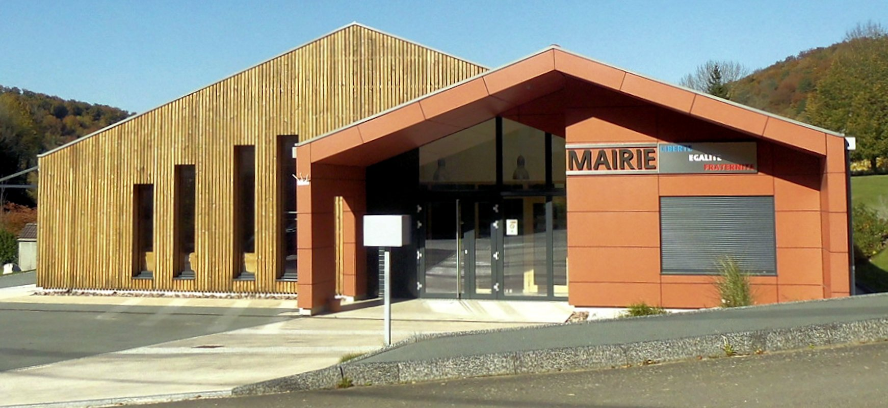 La mairie de Neuchâtel-Urtière